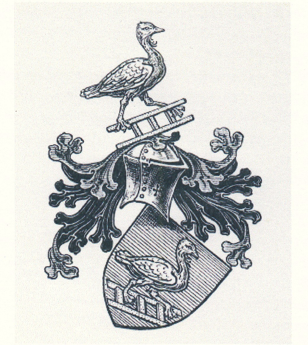 Wappen von Albert und Heinrich Varrentrapp (Hof Fahrentrappe in Hattingen-Oberelfringhausen). Im blauen Schild als Wappenbild eine silberne Trappe (Laufvogel) mit blaugrünen Krallen auf einer goldenen, dreisprossigen Leiter. Auf der Spitze des Helmes wiederholt sich als Helmbusch das Wappenbild. Wappenbrief-Verleihung an die beiden Brüder am 4. August 1417 im Auftrag von König Sigismund, verliehen durch Markgraf Friedrich von Brandenburg, vermutlich während des Konzils von Konstanz. – Original des Wappenbriefes im Österreichischen Staatsarchiv, Haus-, Hof- und Staatsarchiv Wien.